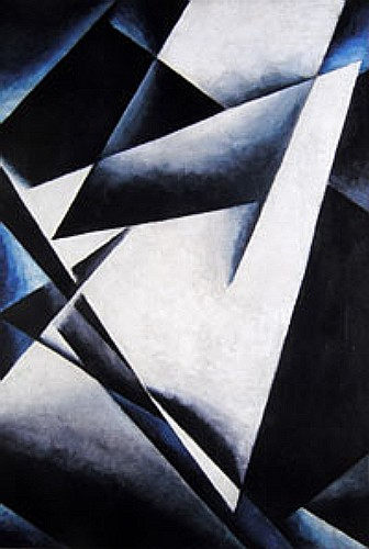 Malerische Architektonik (Öl auf Leinwand)